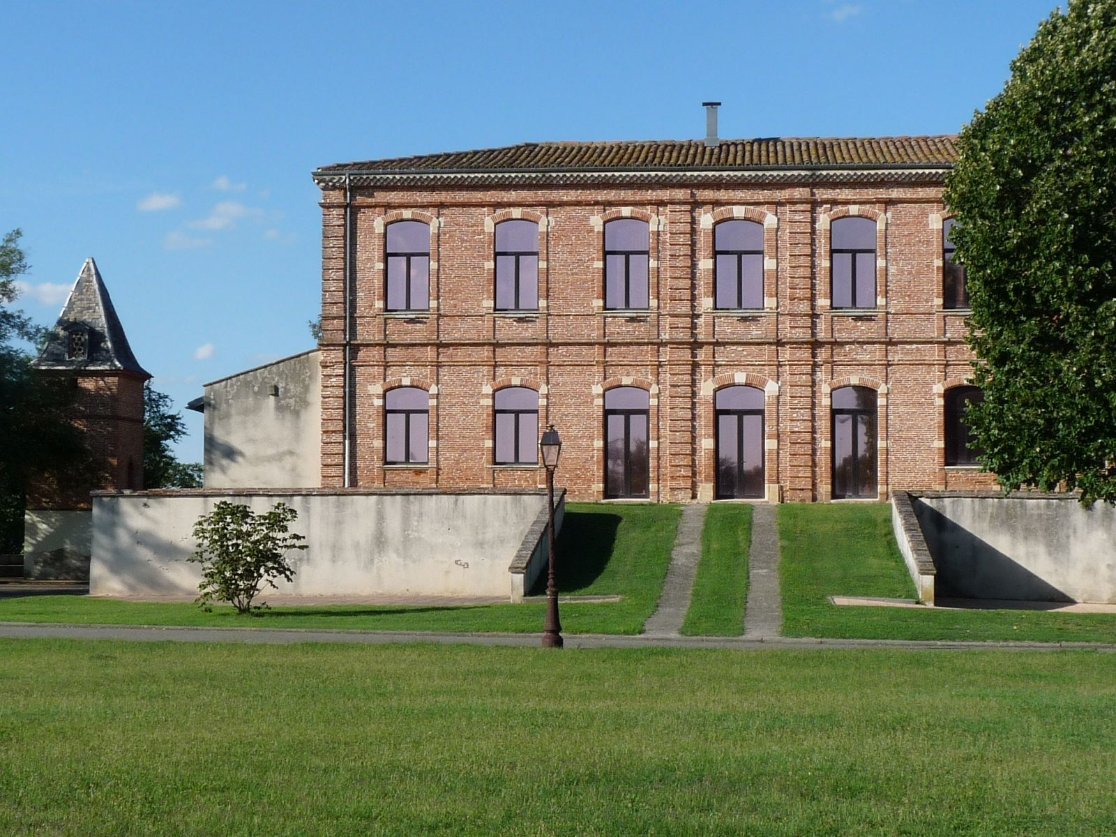 Mairie de Pins-Justaret, Haute-Garonne, France